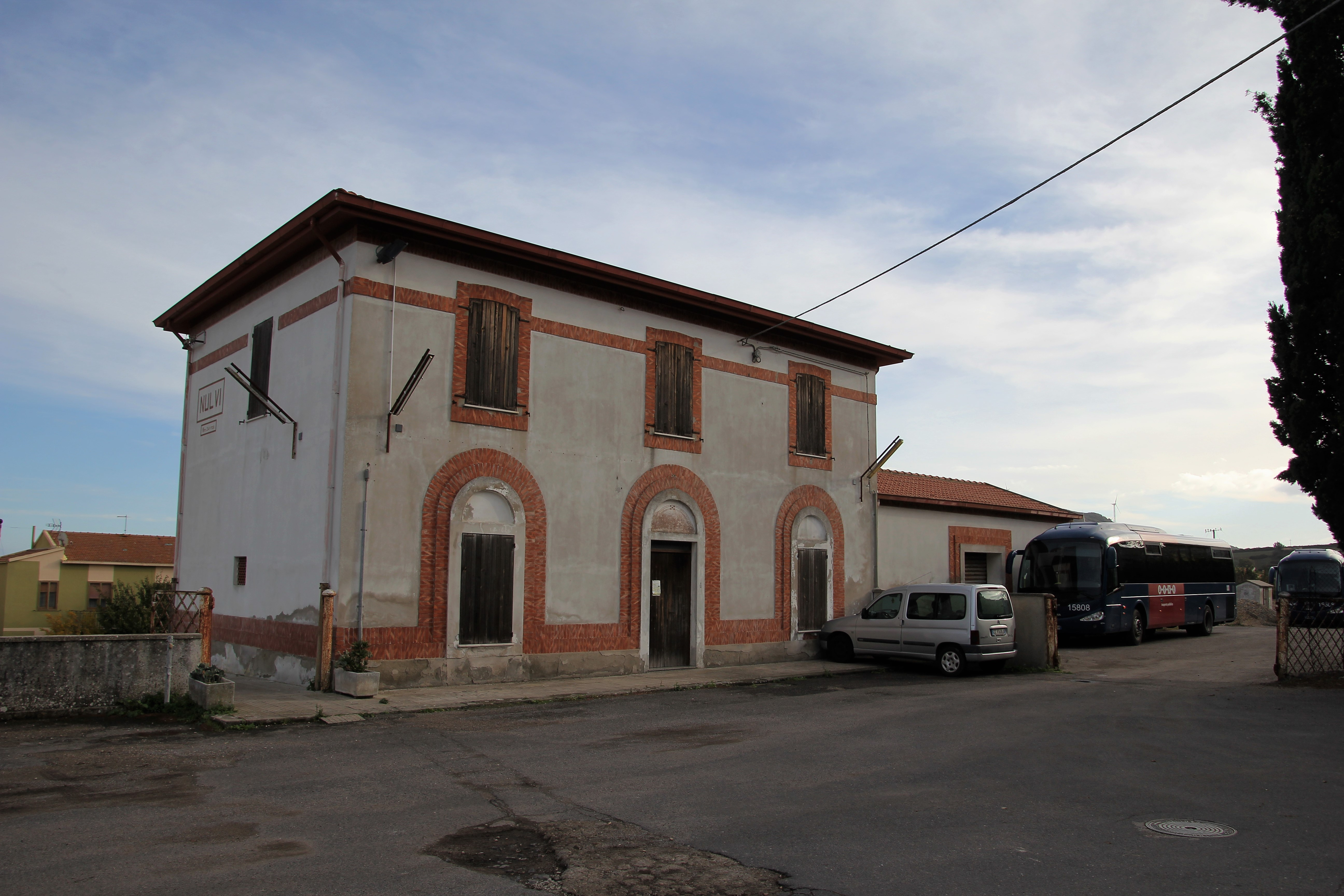 Nulvi, stazione ferroviaria